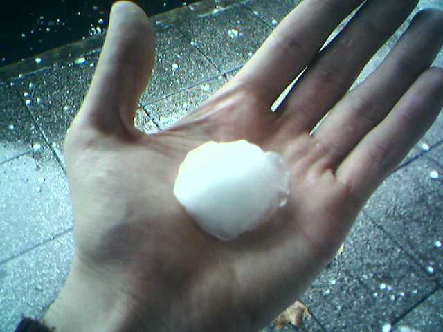 Granizo gigante caido en buenos aires en julio del 2006